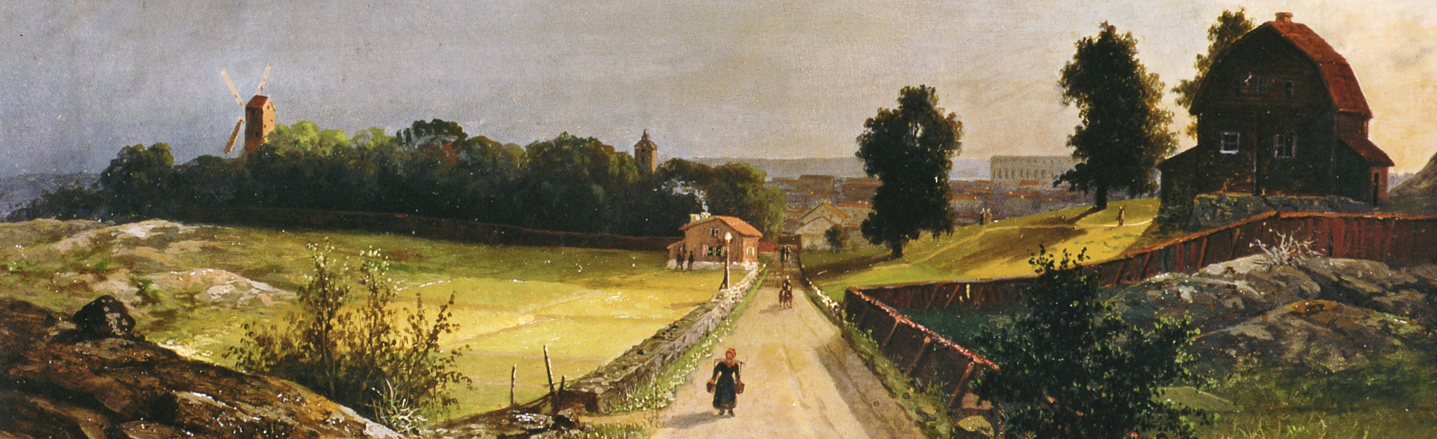 detail